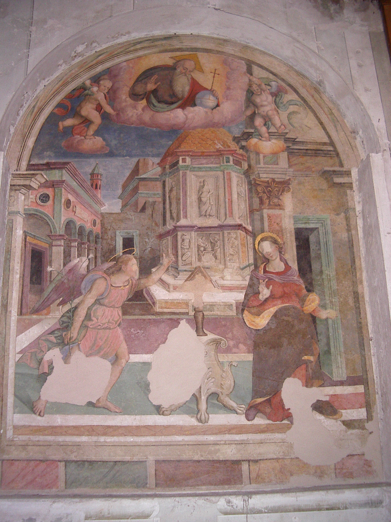 Miracle de Soriano , (première moitié du XVIIe siècle), retable, peintre anonyme de l'école napolitaine,église saint Dominique, Calvi